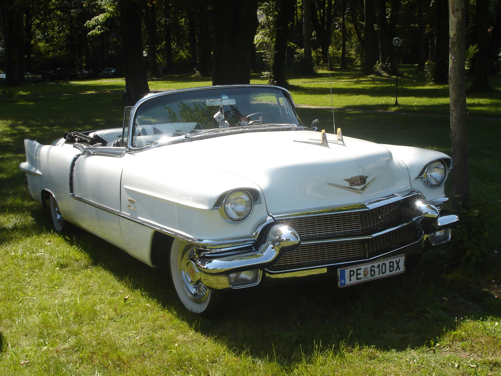 Front eines Cadillac DeVille aus 1956